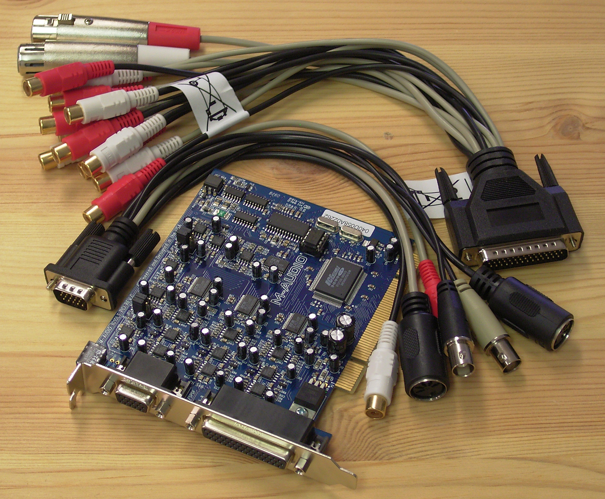 Mehrkanal-Soundkarte M-Audio mit Adapterkabelset